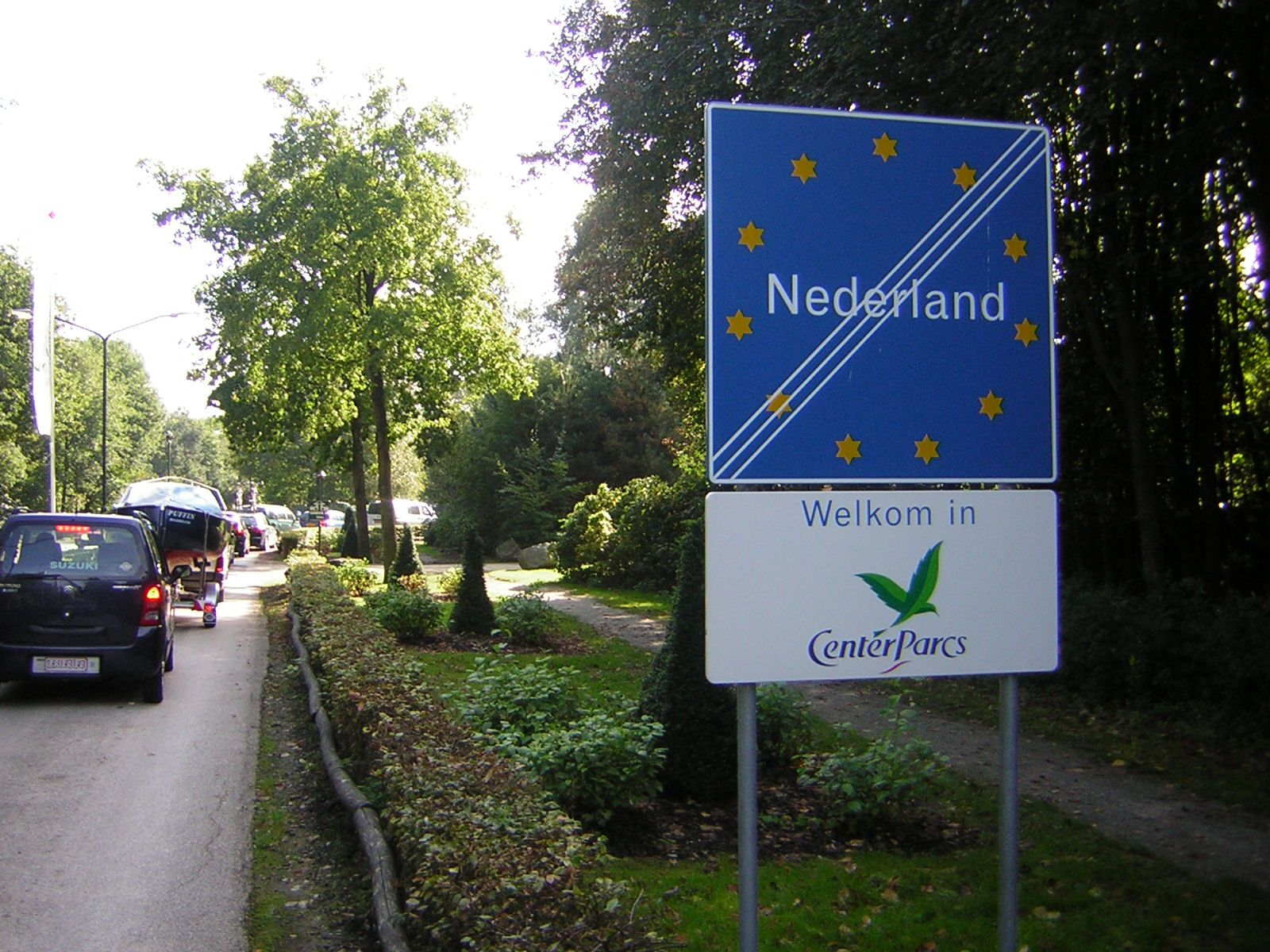 Beschreibung: Center_Parcs, Center_Parcs, Center_Parcs, in den Niederlanden: De Eemhof Fotograf: Trexer, User:Trexer Aufgenommen: 2006 mit Nikon Coolpix 2200